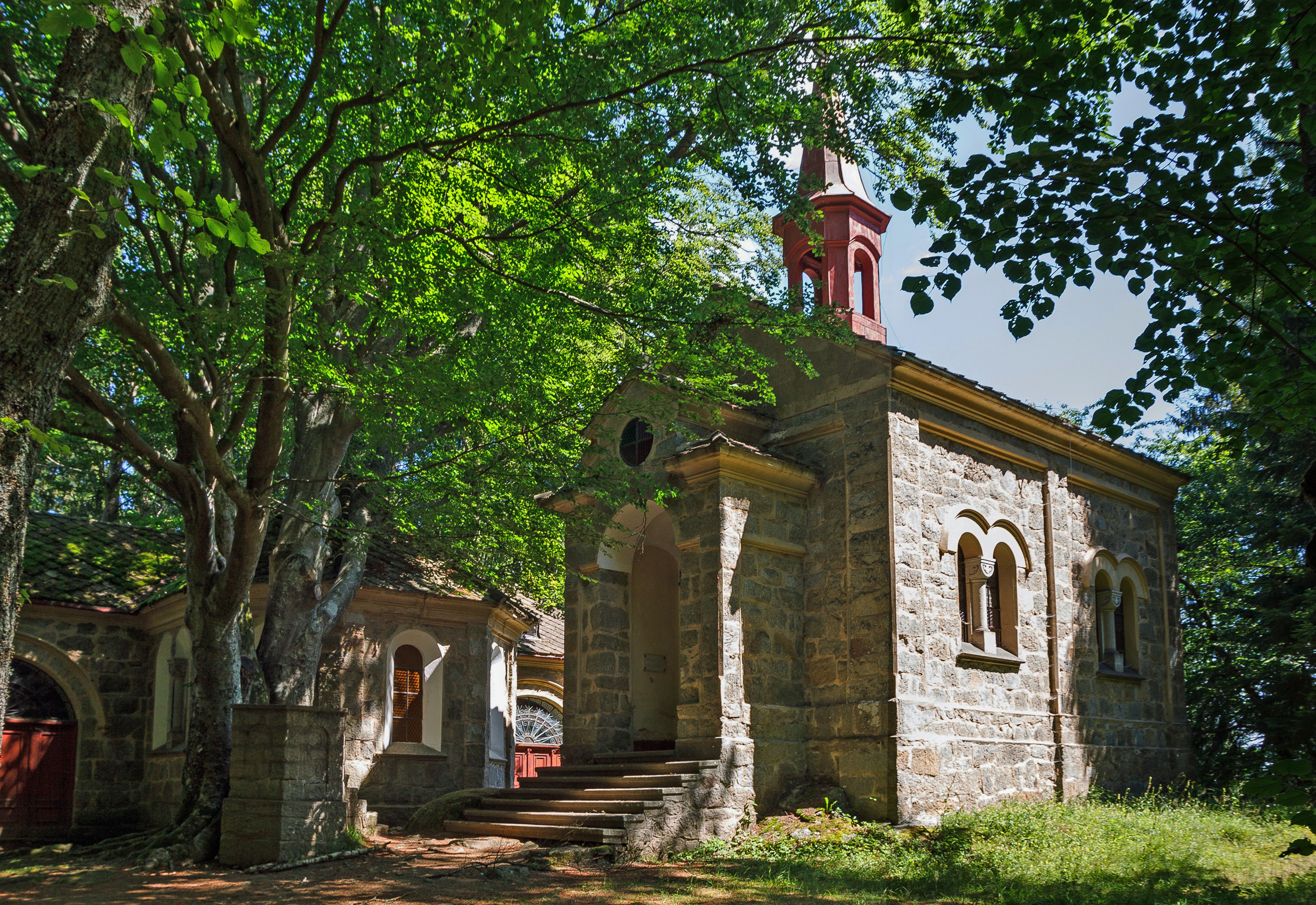 Poutní místo Maria Rast, k. ú. Mnichovice u Loučovic (obec Loučovice) a k. ú. Vyšší Brod.